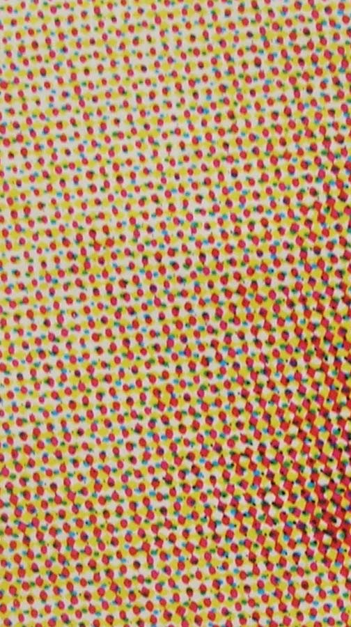 Mehrfarbdruck, stark vergrößerter Ausschnitt aus einem Bild